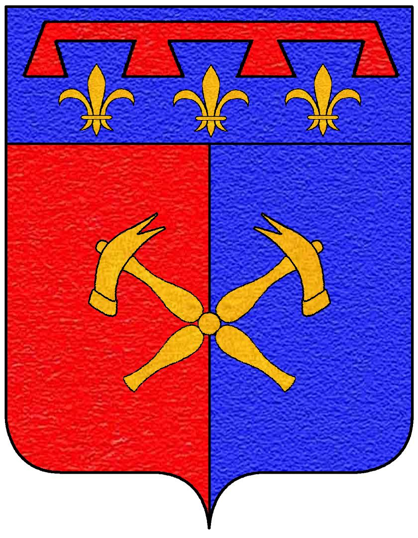 Stemma Sergardi: partito di rosso e d'azzurro, a due martelli d'oro, decussati e attraversanti; il tutto abbassato sotto il capo d'Angiò